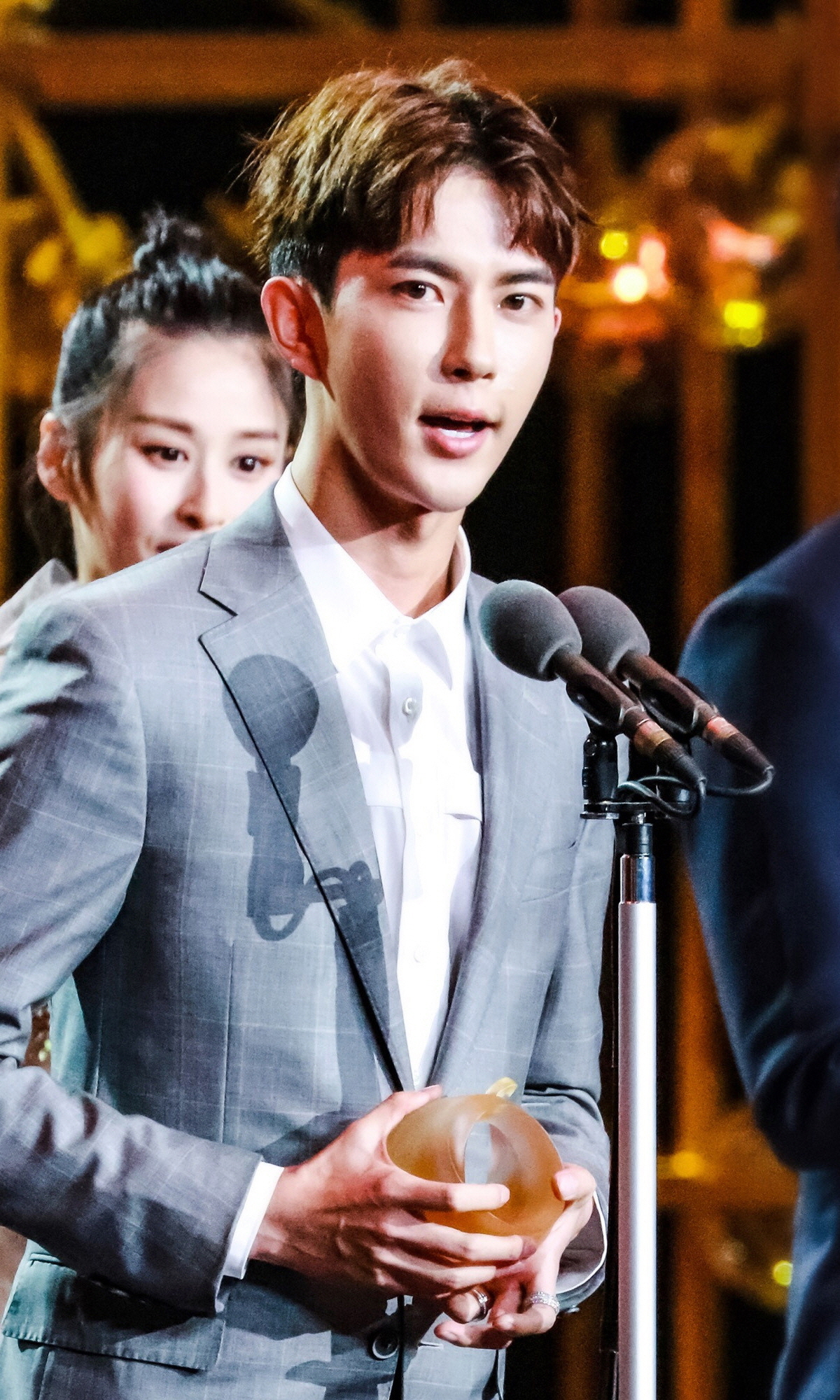 20180313 电视剧品质盛典 明星